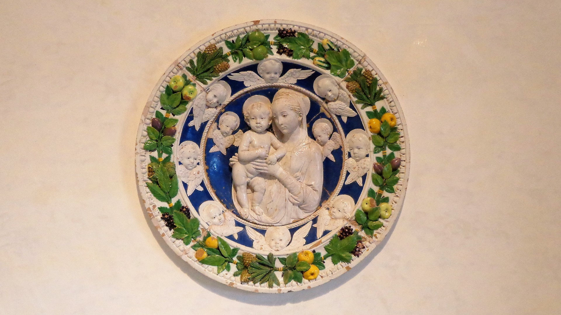 Maiolica invetriata